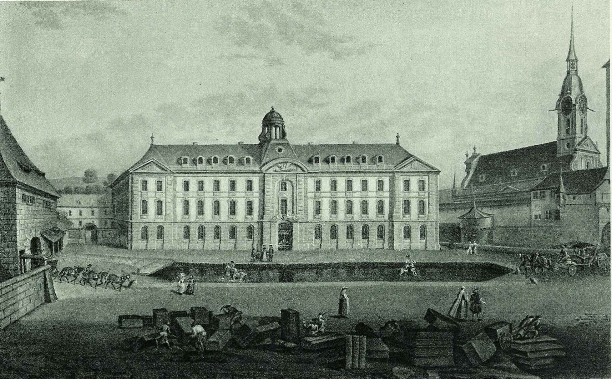 Das Burgerspital in Bern und die Heiliggeistkirche nach 1742. Oelgemälde von Johann Grimm. Links das innere Murtentor, in der Mitte die Roß schwemme, welche die vom Land in die Stadt fahrenden Fuhrwerke durchqueren mussten